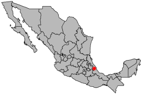 locator map of Xalapa de Enríquez, Veracruz, México